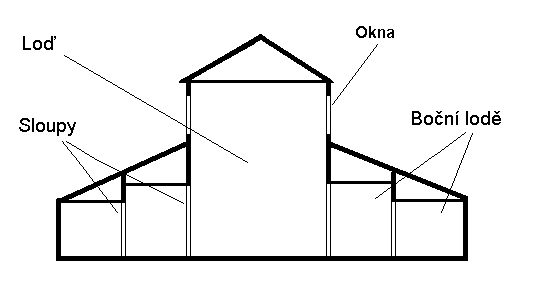 Schématický průřez bazilikou. Přeloženo z polské Wikipedie. Autor: Wikipedysta:Silthor